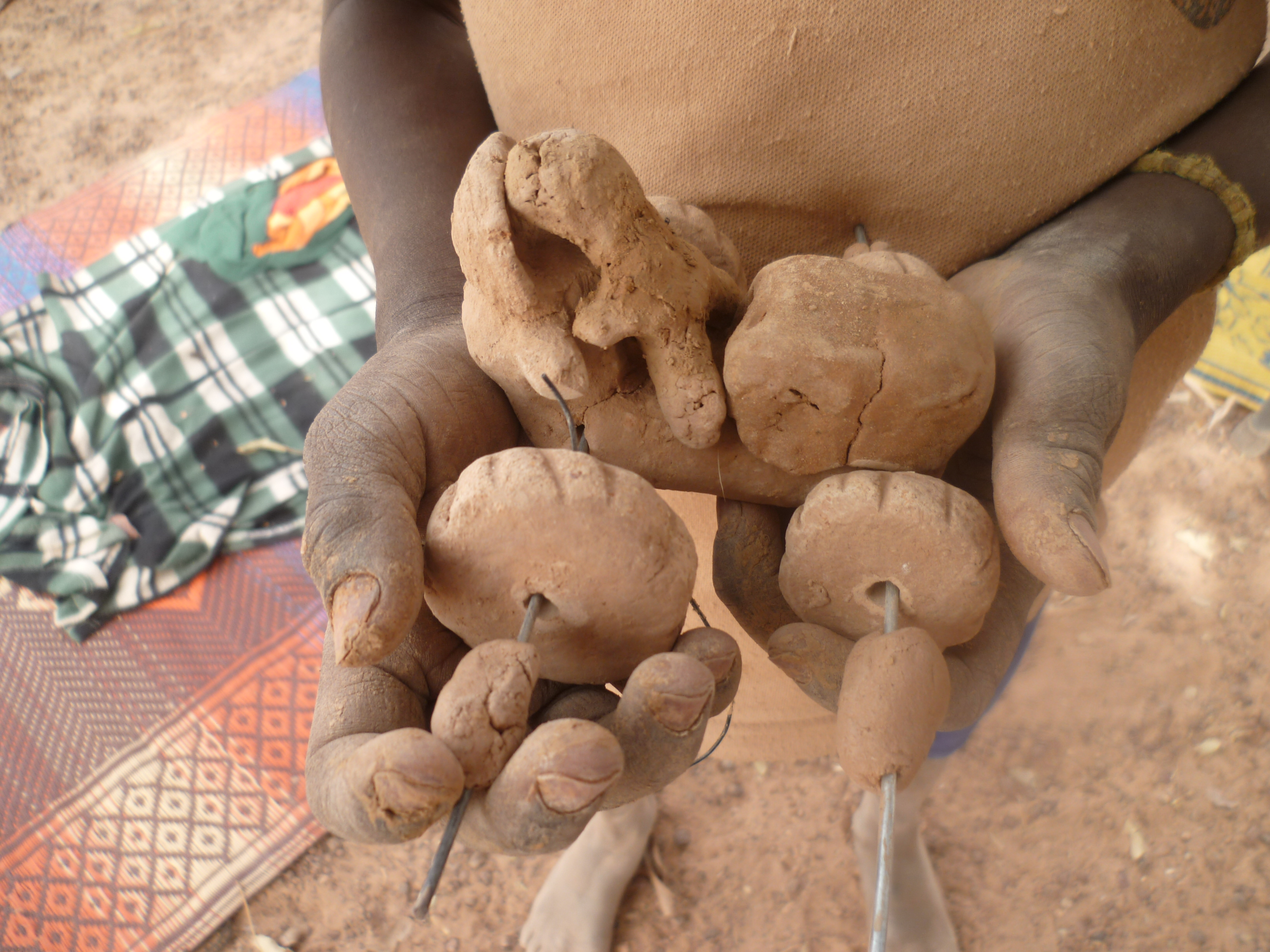 Burkina Faso - Jouet véhicule en terre glaise, fait par un enfant. Quand on ne peut pas acheter de jouet, on en fabrique un ! This is an image with the theme "Africa on the Move or Transport" from: Burkina Faso